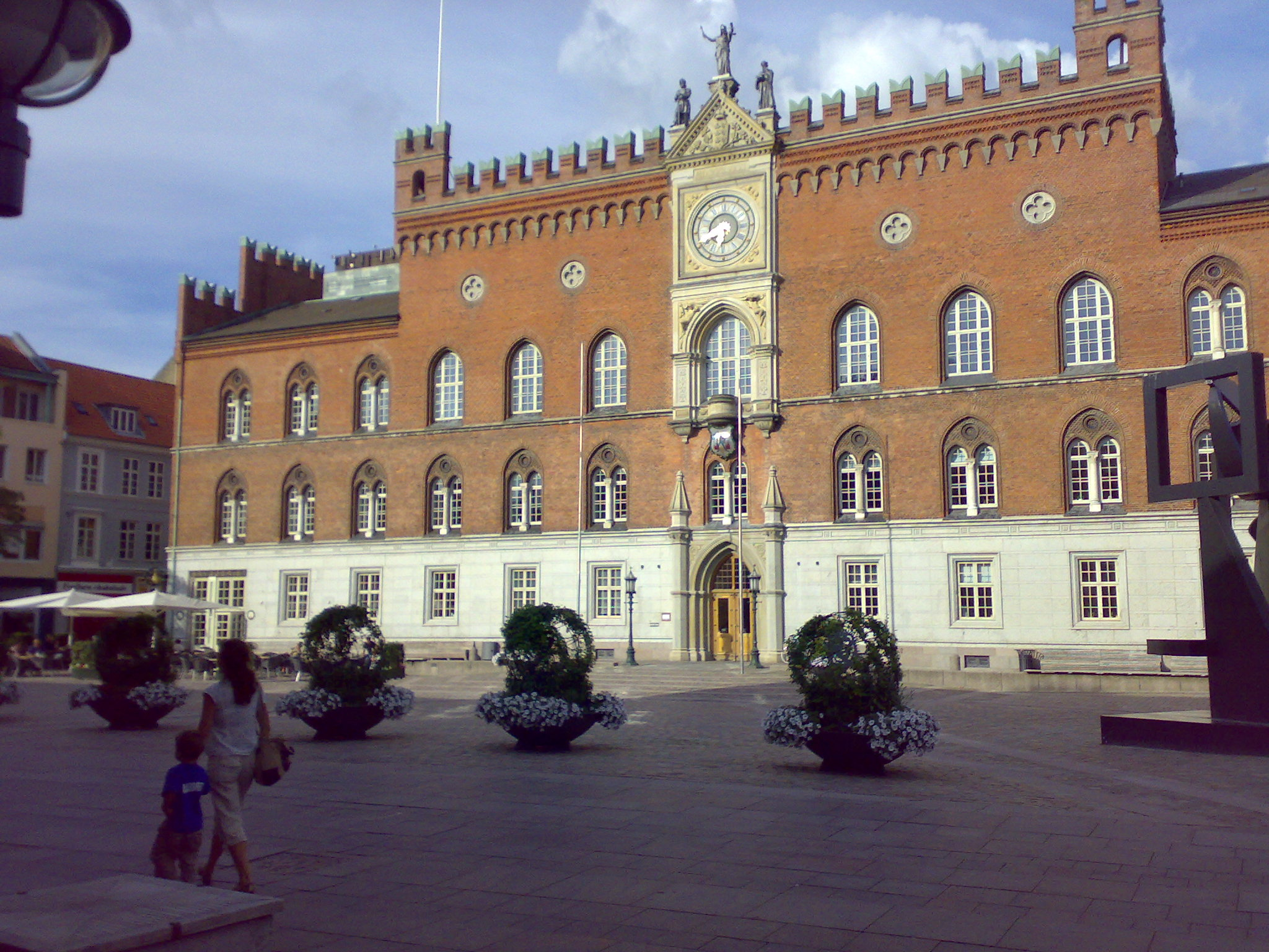 Odense, Denmark